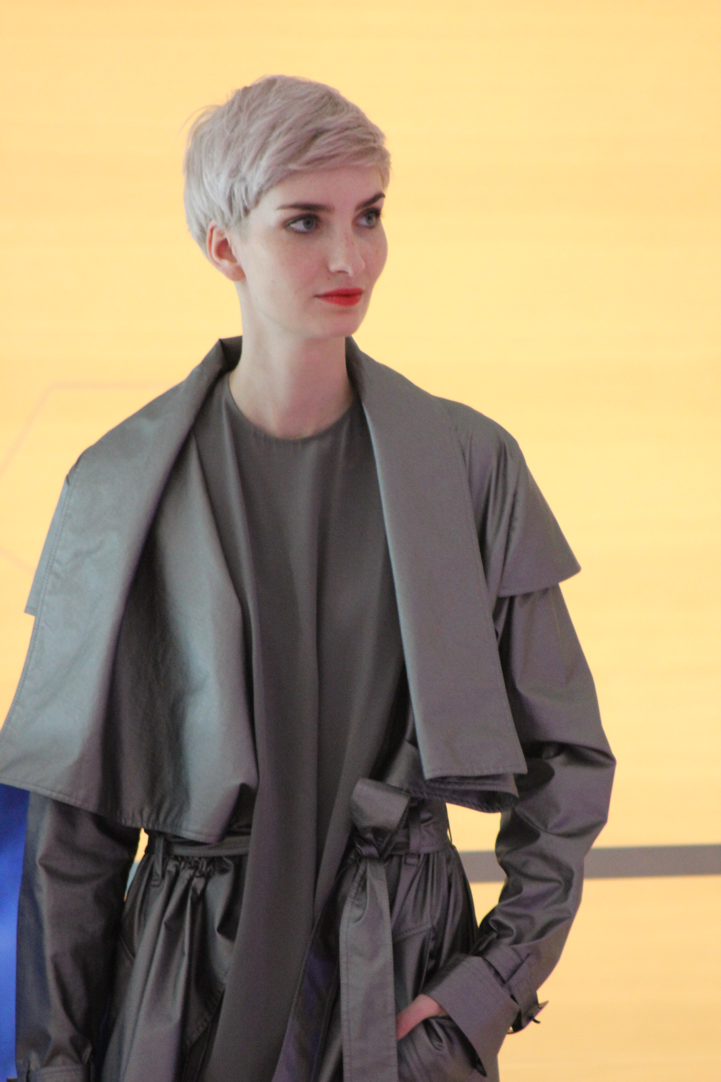 Model Anika Scheibe beim Event 5 Jahre BMW Welt